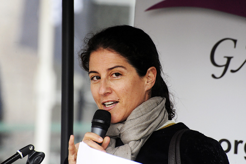 Dilsa Demirbag-Sten